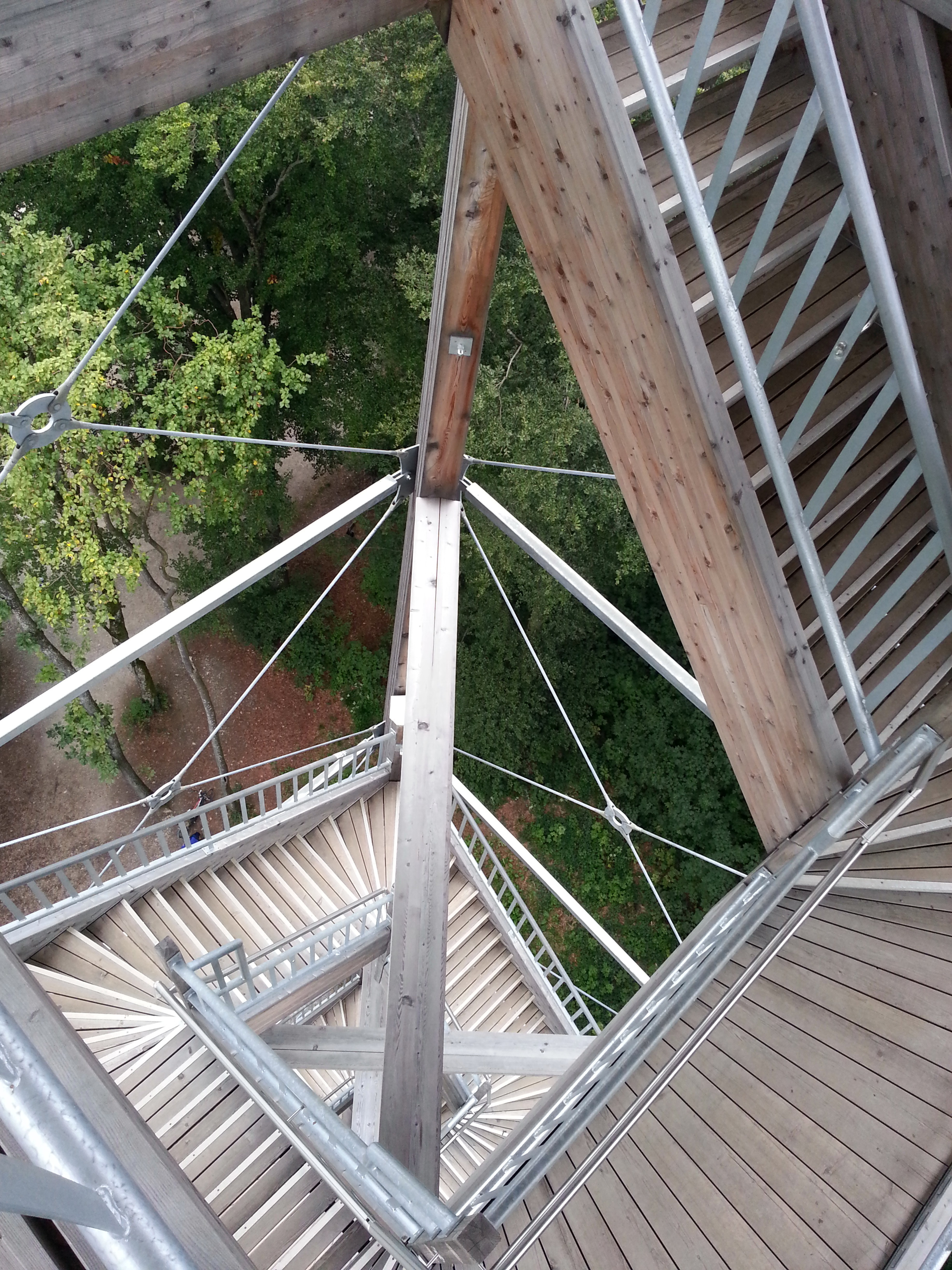 Treppen des Altbergturms, Dänikon